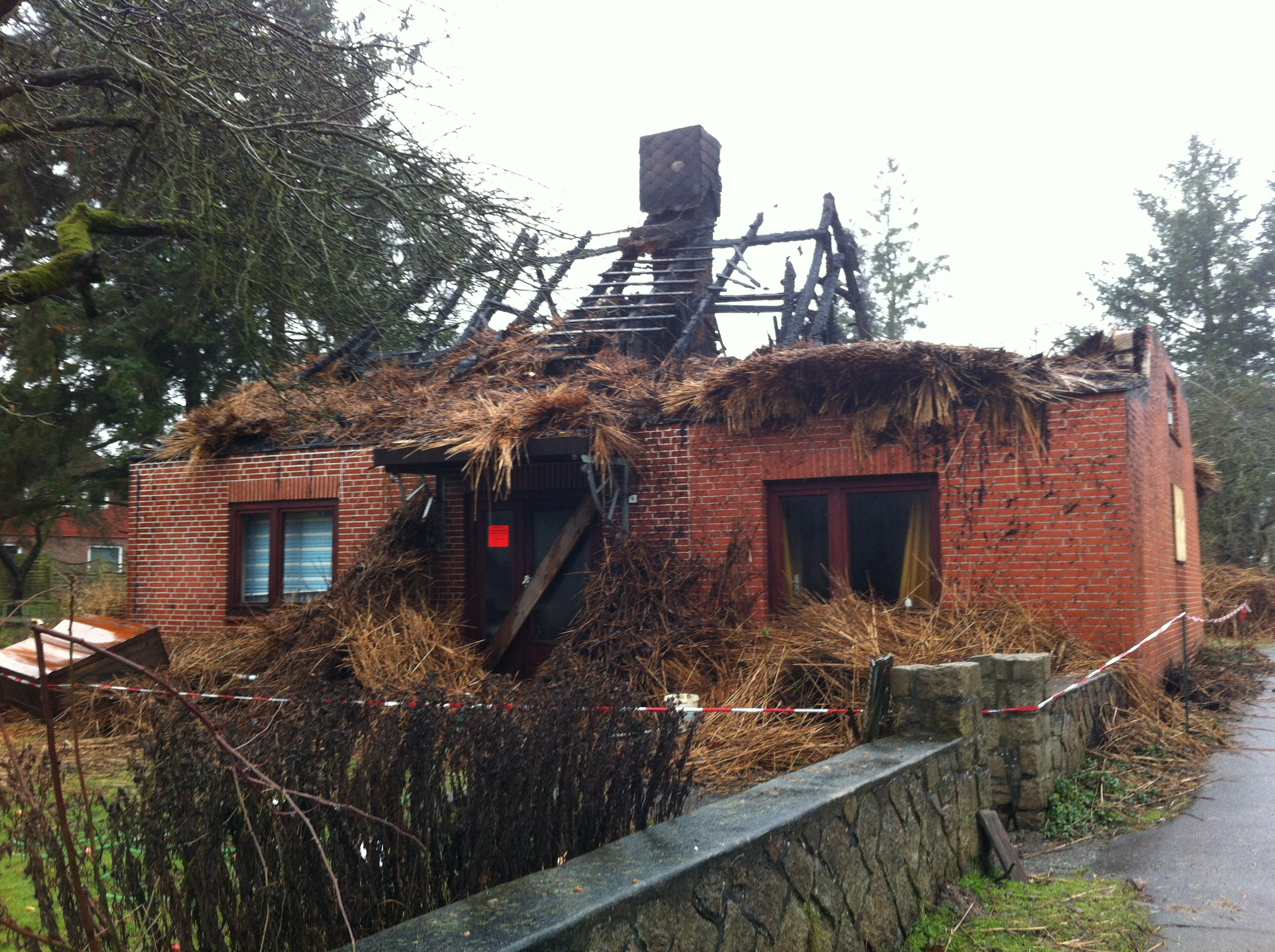 dem Feuer zum Opfer gefallenes reetgedecktes Haus